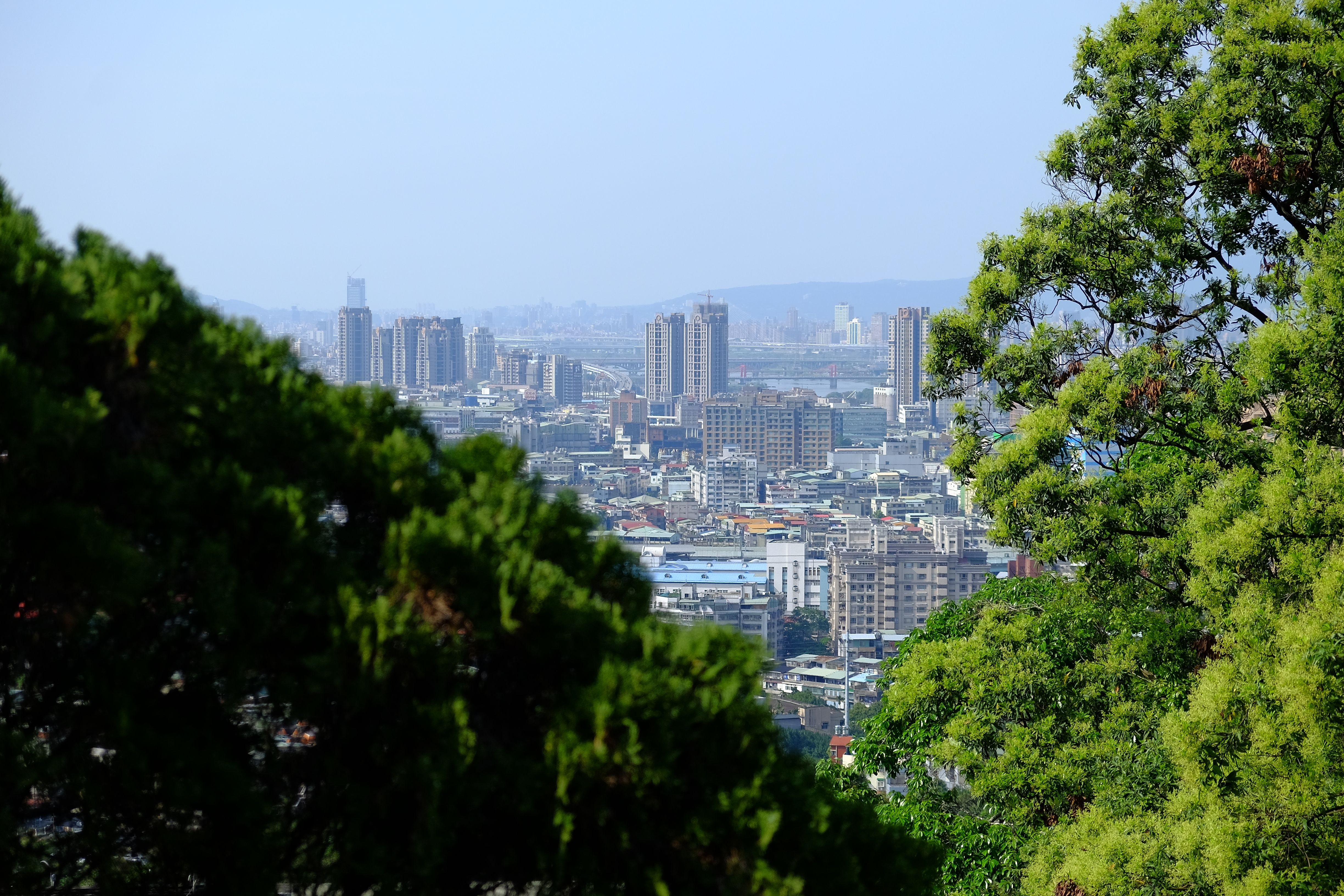 台灣圓通禪寺遠眺台北盆地